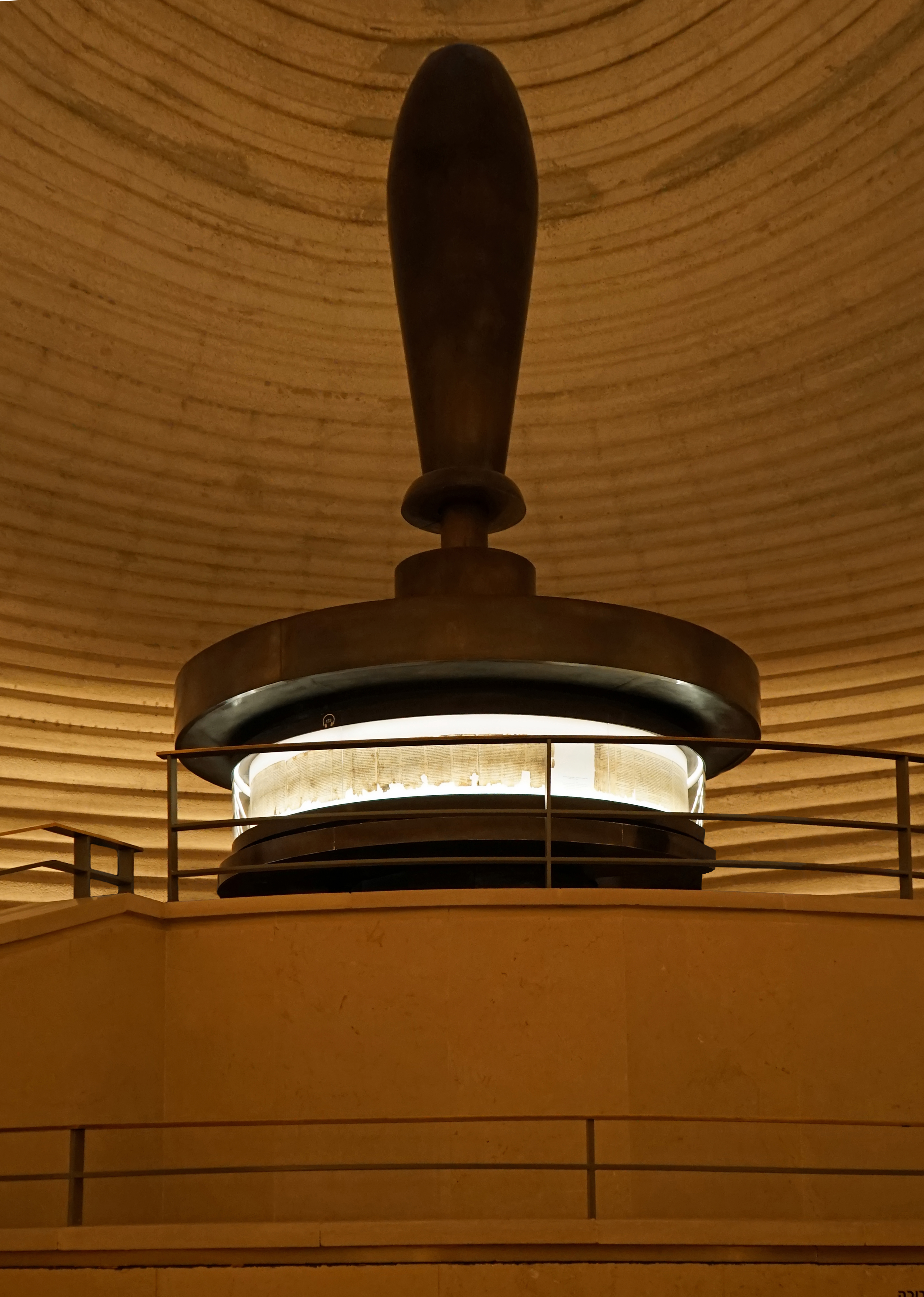 מגילת ישעיהו בהיכל הספר